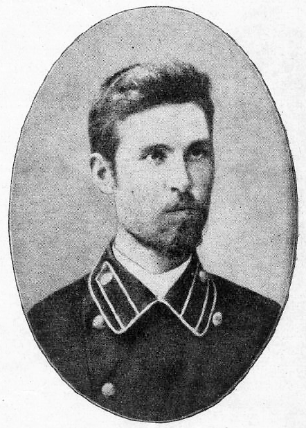 Иван Степанович Проханов в студенческие годы